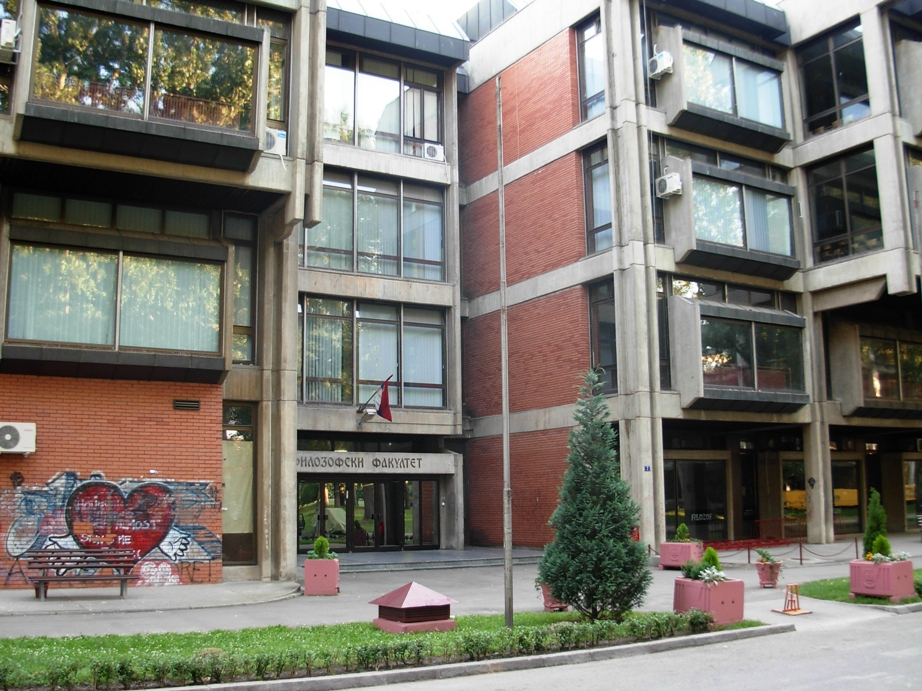 Filozofski fakultet Univerziteta u Novom Sadu